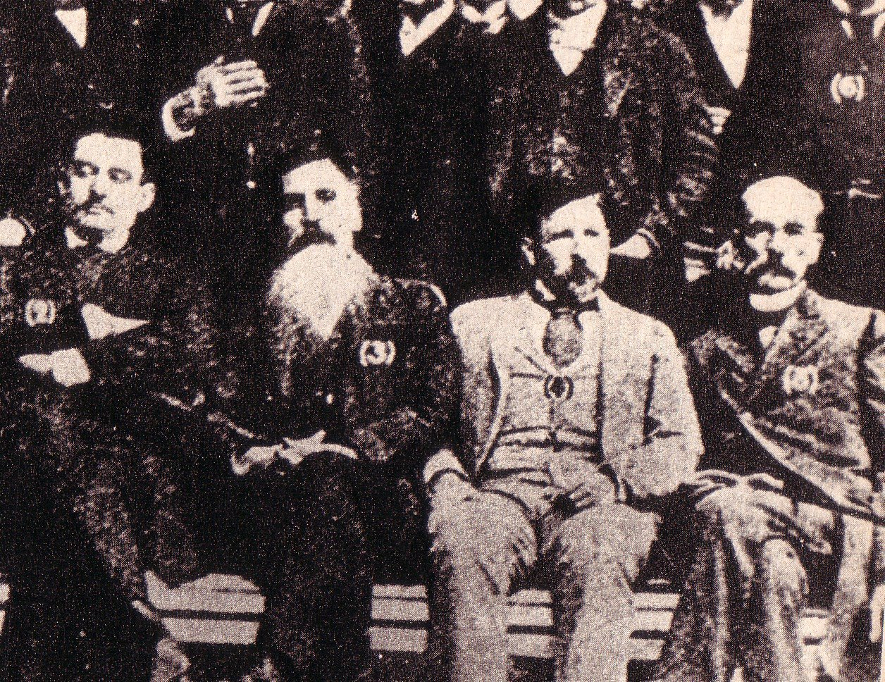 Es una foto de (de izquierda a derecha): -sentados- Guillermo Leguizamon, Marcelo T. de Alvear, Lenadro N. Alem, Francisco A. Barroetaveña y Juan Passe.